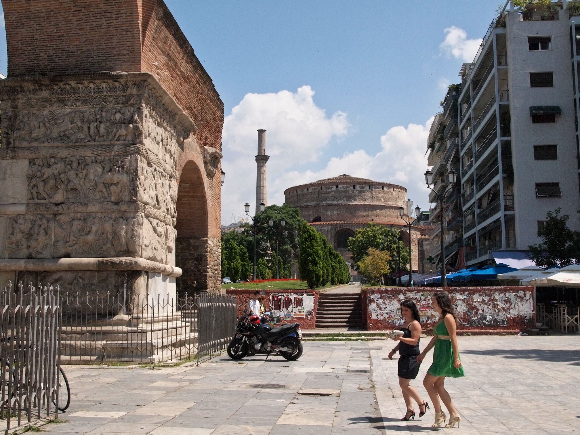 Арка Галерия и Ротонда